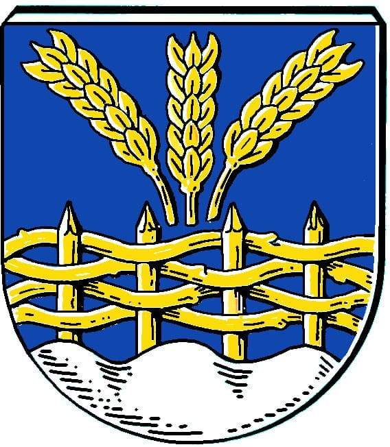 Coat of arms Hagermarsch, Wappen der Gemeinde Hagermarsch